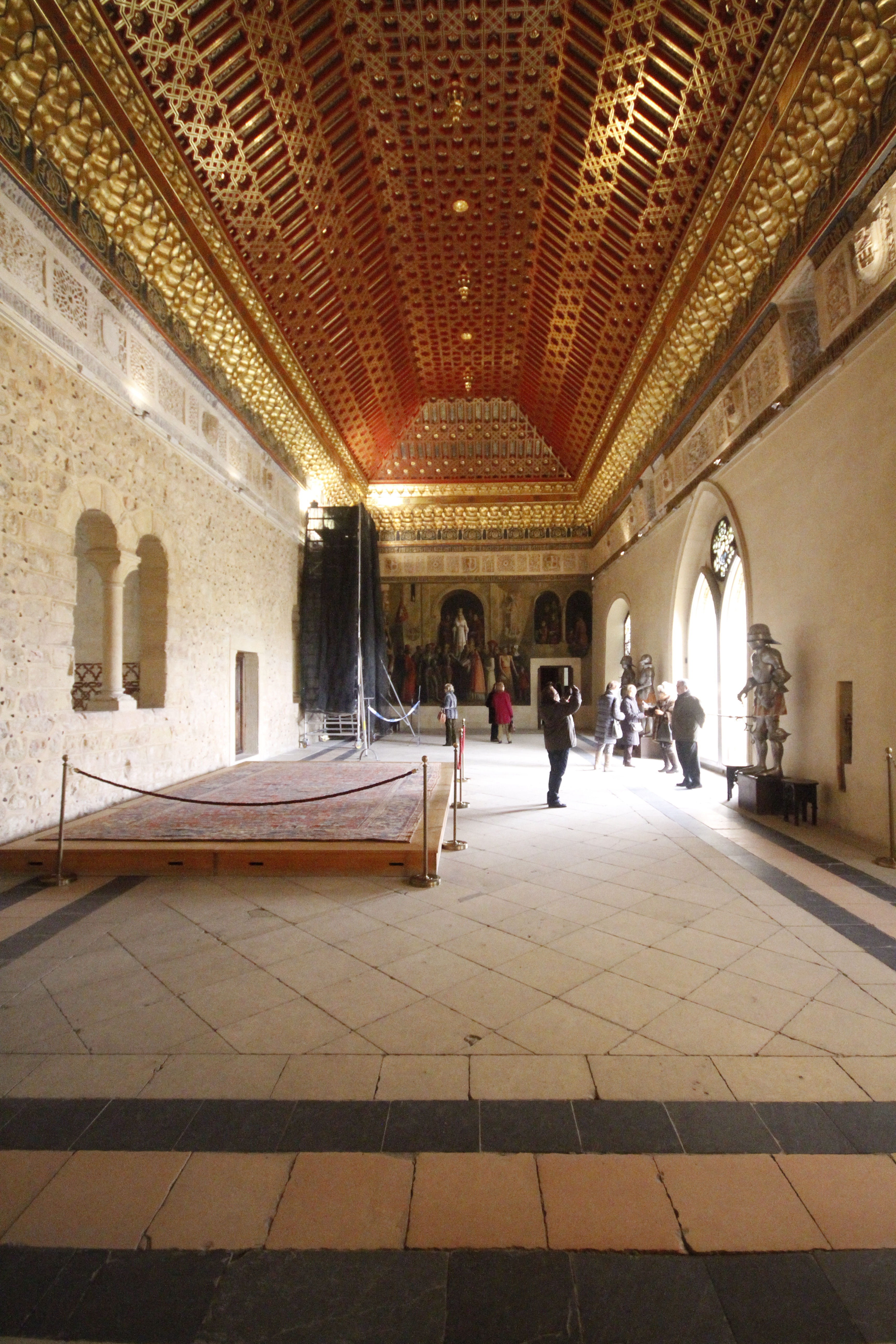 Sala do Galeão